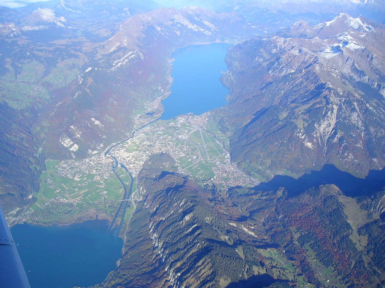 Interlaken mit Brienzersee im Hintergrund und Thunersee im Vordergrund